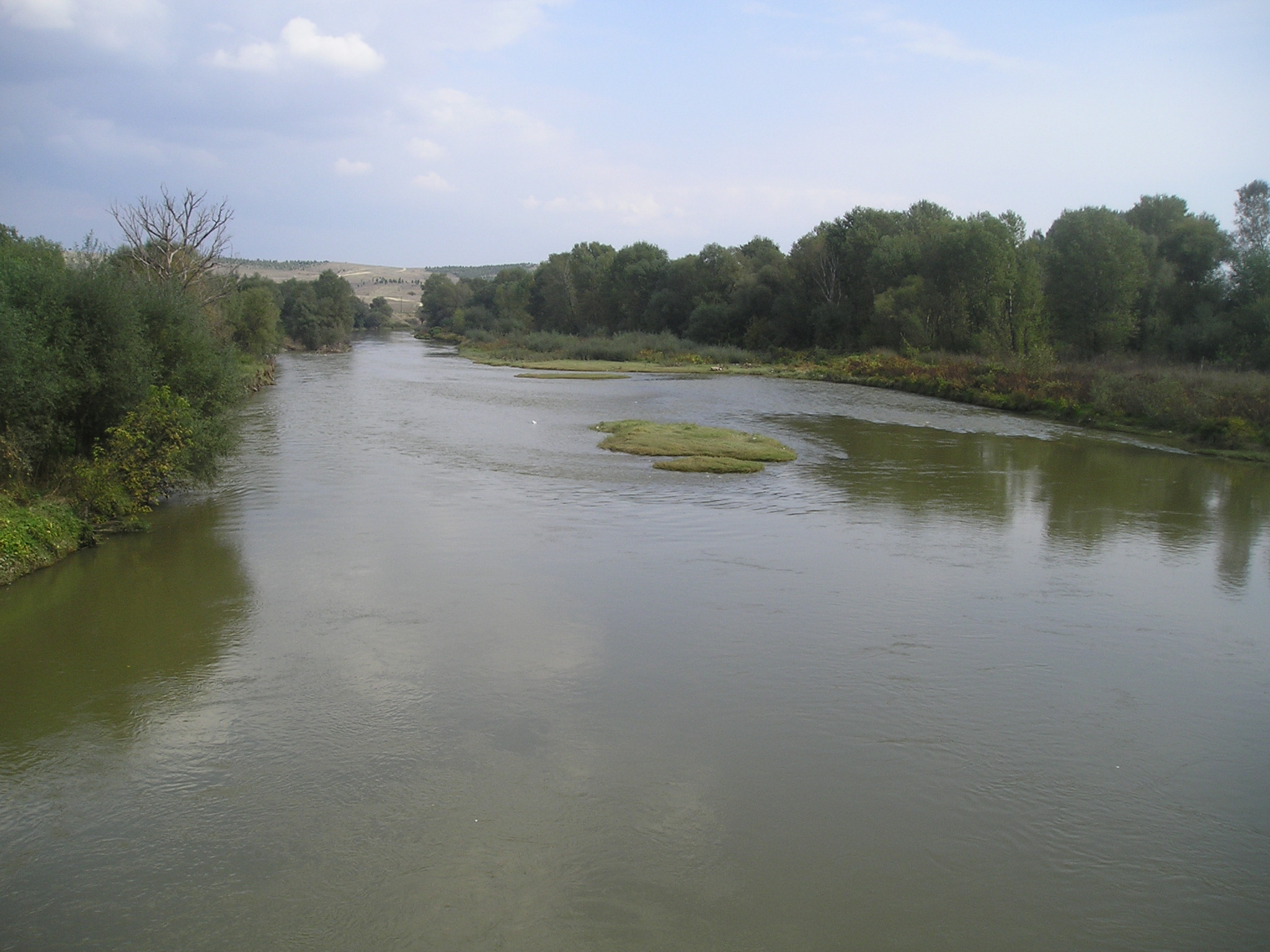 Vardar river near Nogaevci village, R.o.Macedonia Вардар, кај селото Ногаевци, велешко, Македонија Rzeka Wardar koło wsi Nogaevci, Macedonia